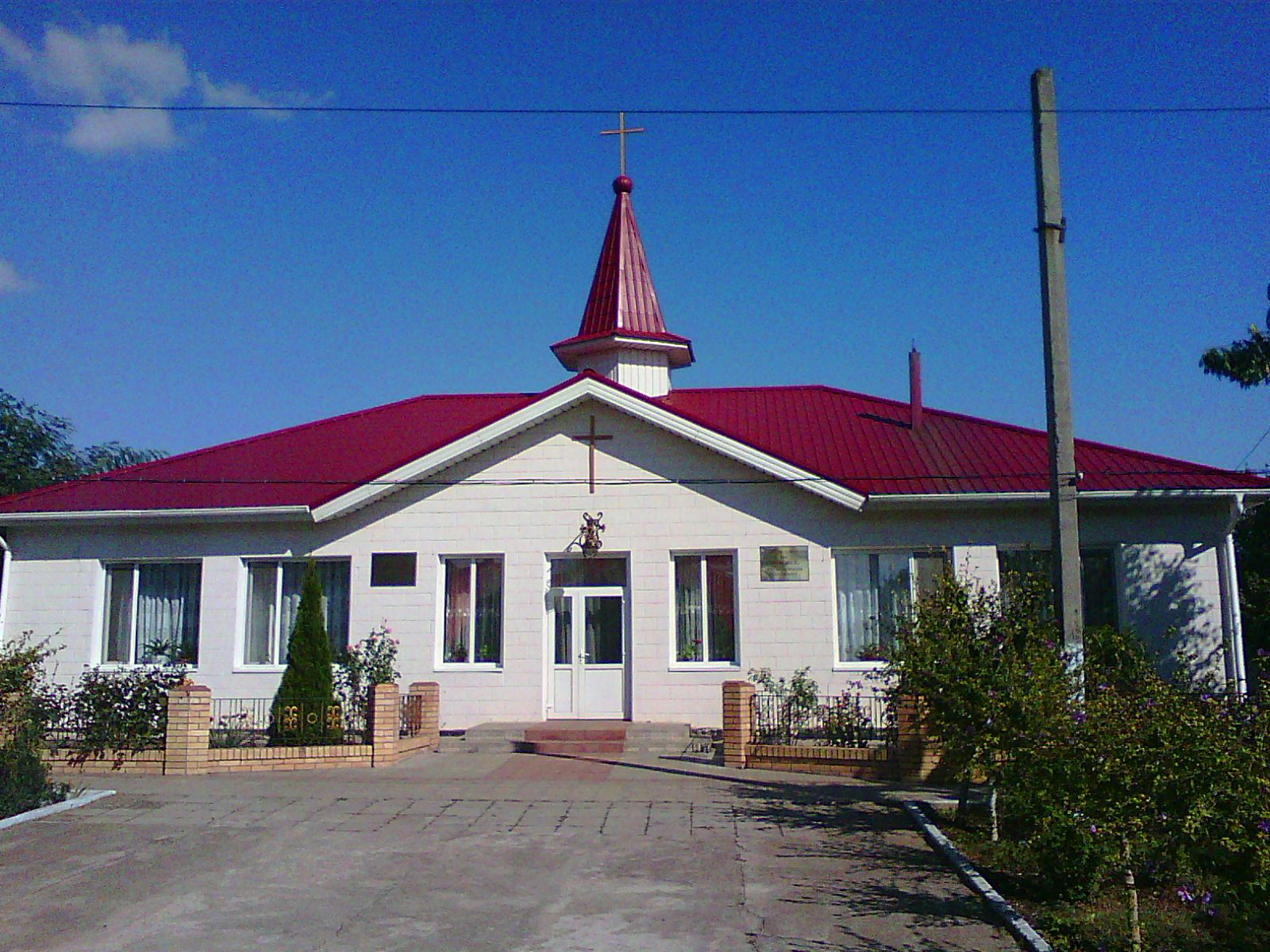 Баптистська церква в селі Саф'яни, Ізмаїльський район, Одеська область